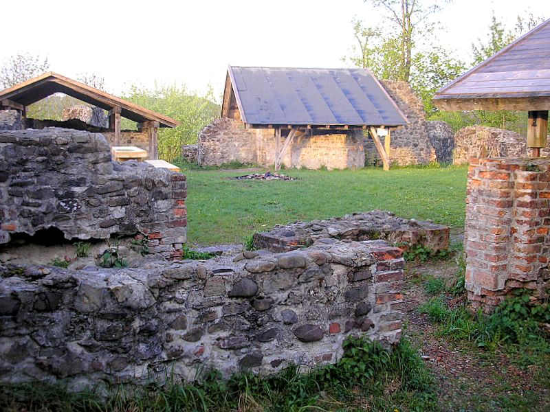 Burg Wolkenberg bei Wildpoldsried (Landkreis Oberallgäu, Bayerisch-Schwaben). Der Burghof nach Osten. Eigene Aufnahme, Mai 2008 / Wolkenberg castle near Wildpoldsried (Landkreis Oberallgäu, Bavaria, Germany). The courtyard, looking east. Own photo, May 2008